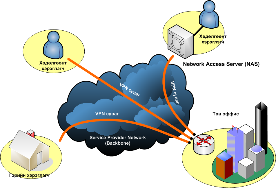 Монгол: Remote access VPN